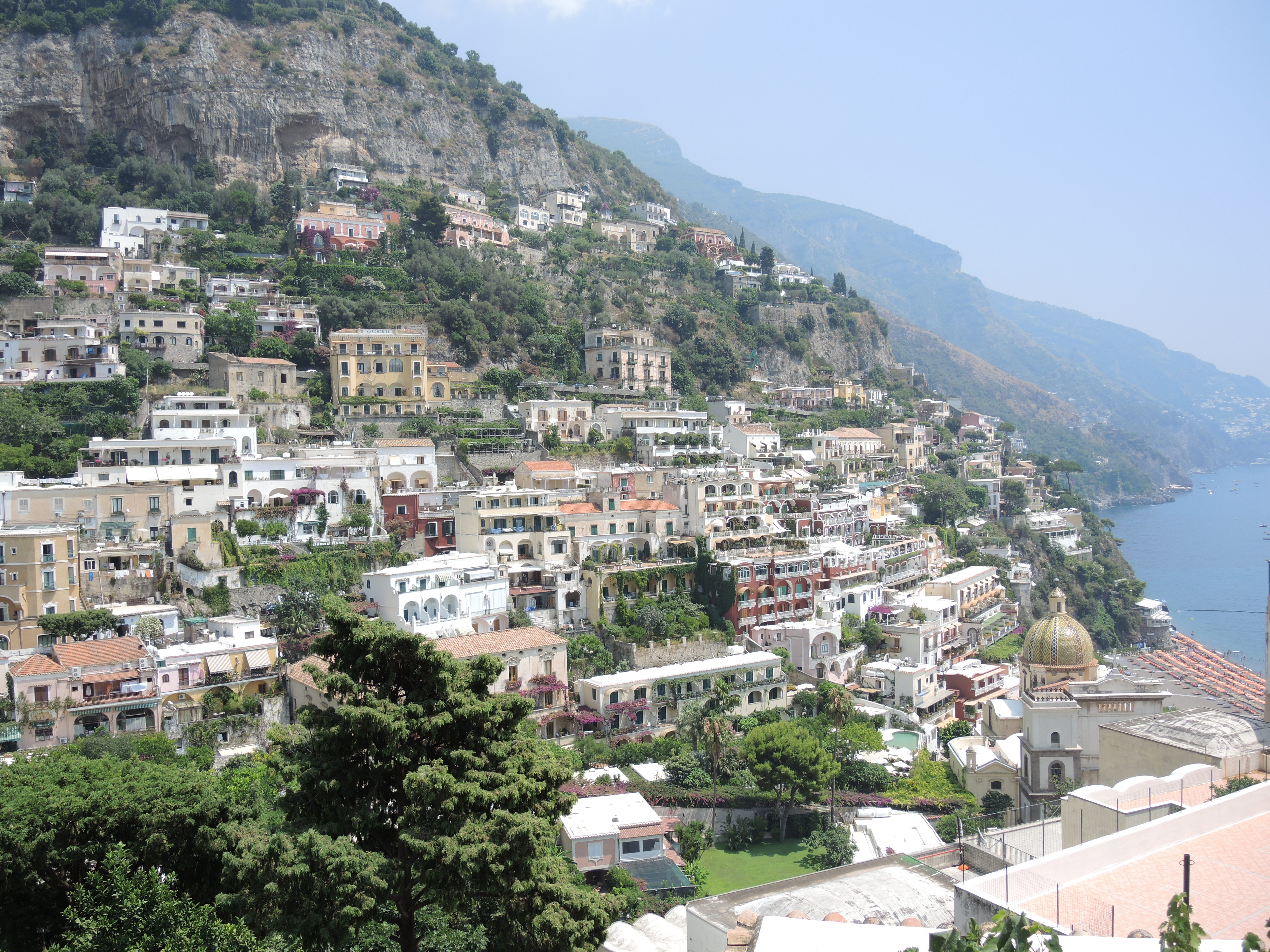 Pozitano şəhəri